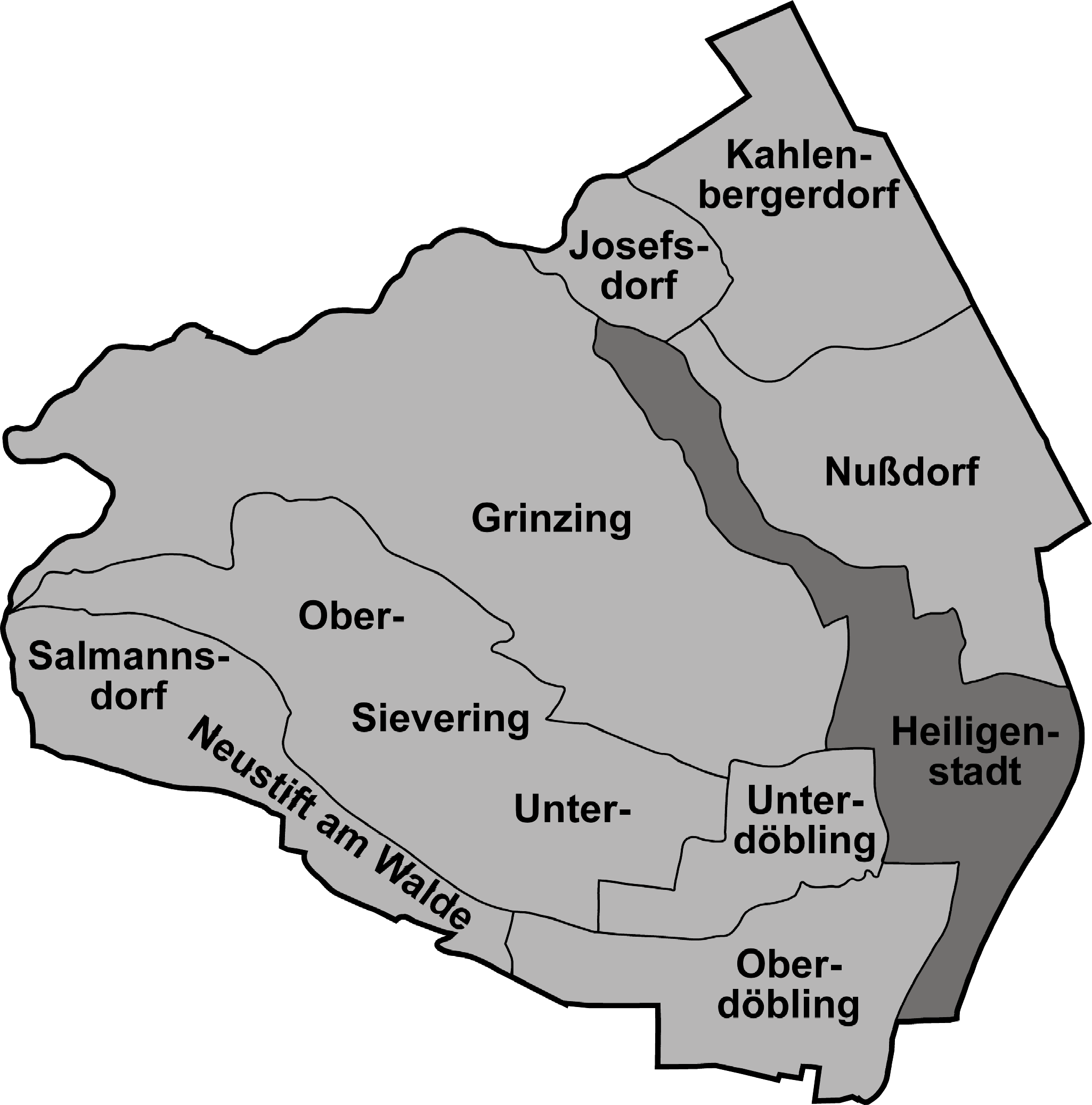 Map of Döbling, Heiligenstadt highlighted